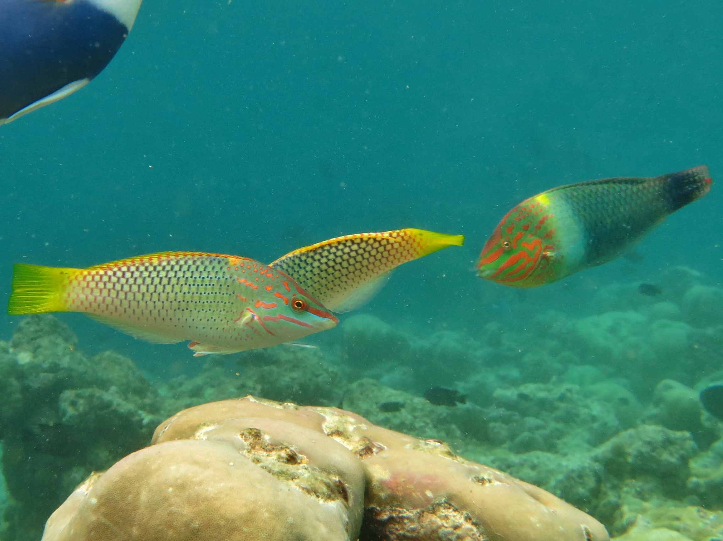 Trois labres échiquiers (Halichoeres hortulanus), deux femelles et un mâle, aux Maldives (Milhaidhoo, atoll de Baa).